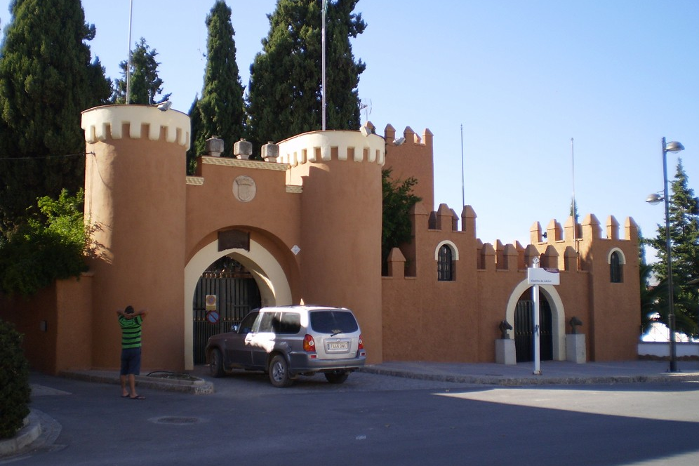 Vista de la fachada principal del Castillo de Láchar (Granada, España)